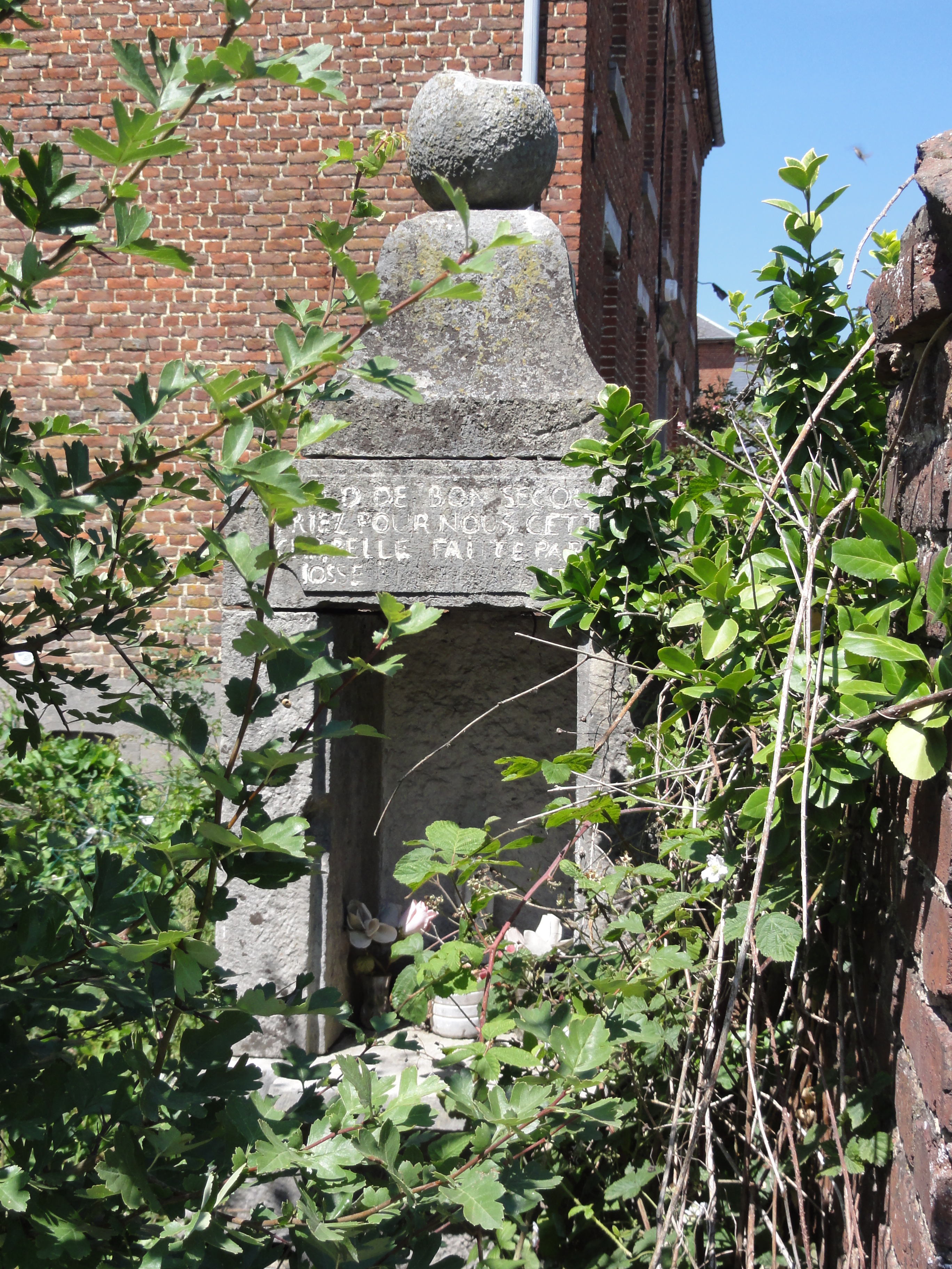 Ramousies (Nord, Fr) chapelle N.D. de Bon Secours (jardin au centre village)